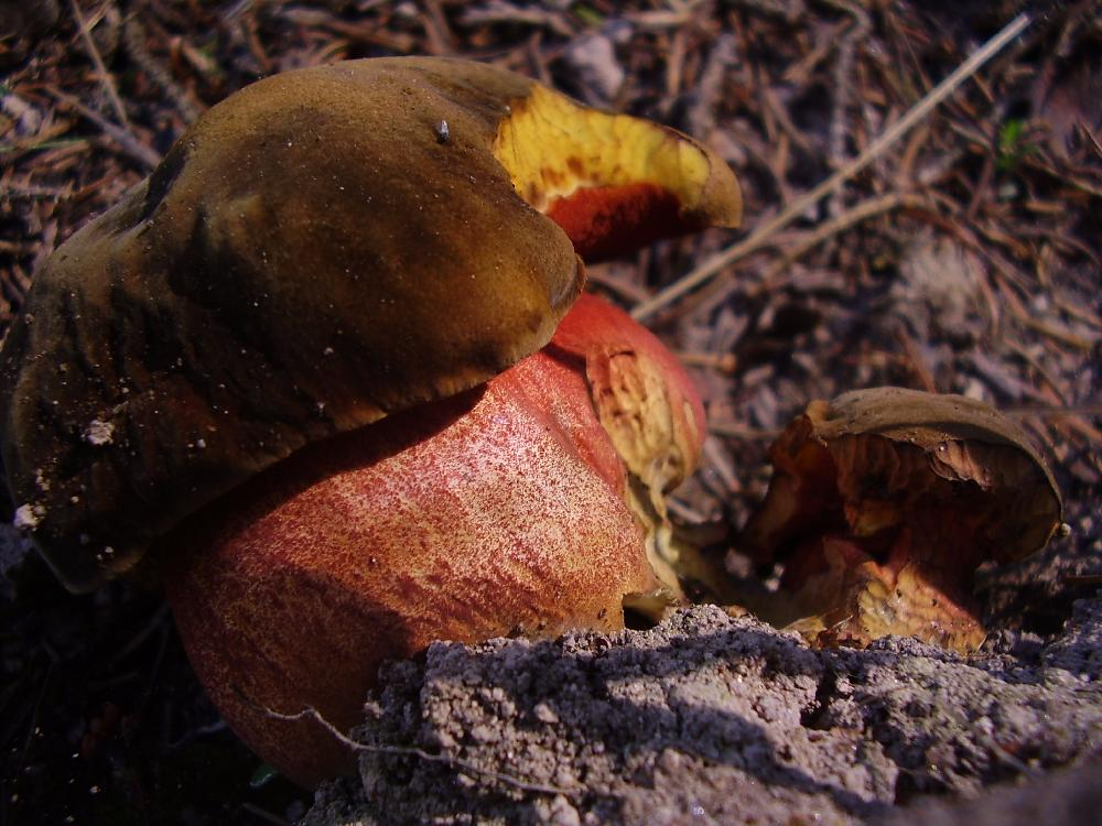 Червеностъблена манатарка от Родопите край град Сърница, Август 2006. © 2006 Павел Неделев